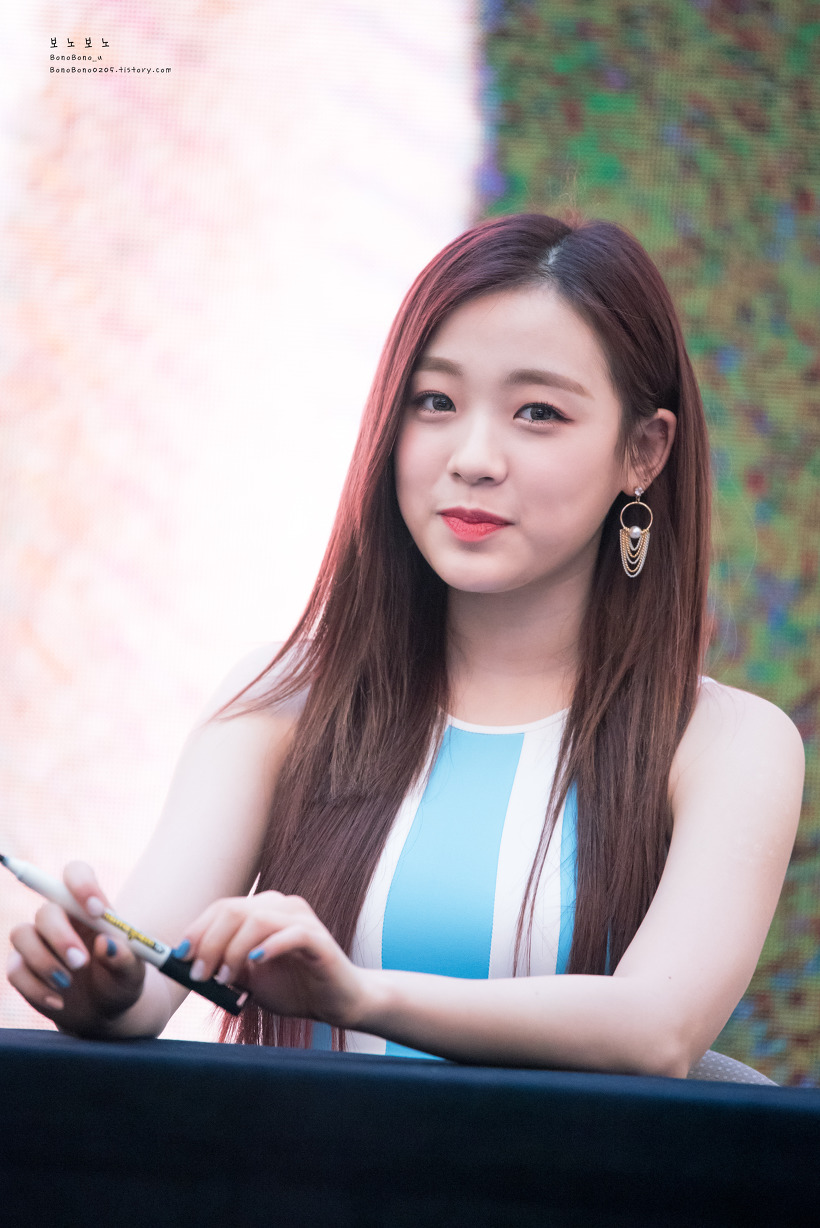 180325 에이프릴 고양 스타필드 팬사인회 이진솔